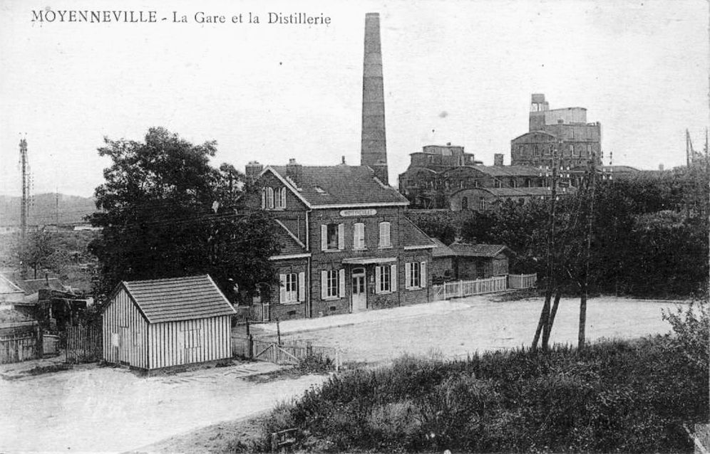 La gare et la distillerie de Moyenneville.